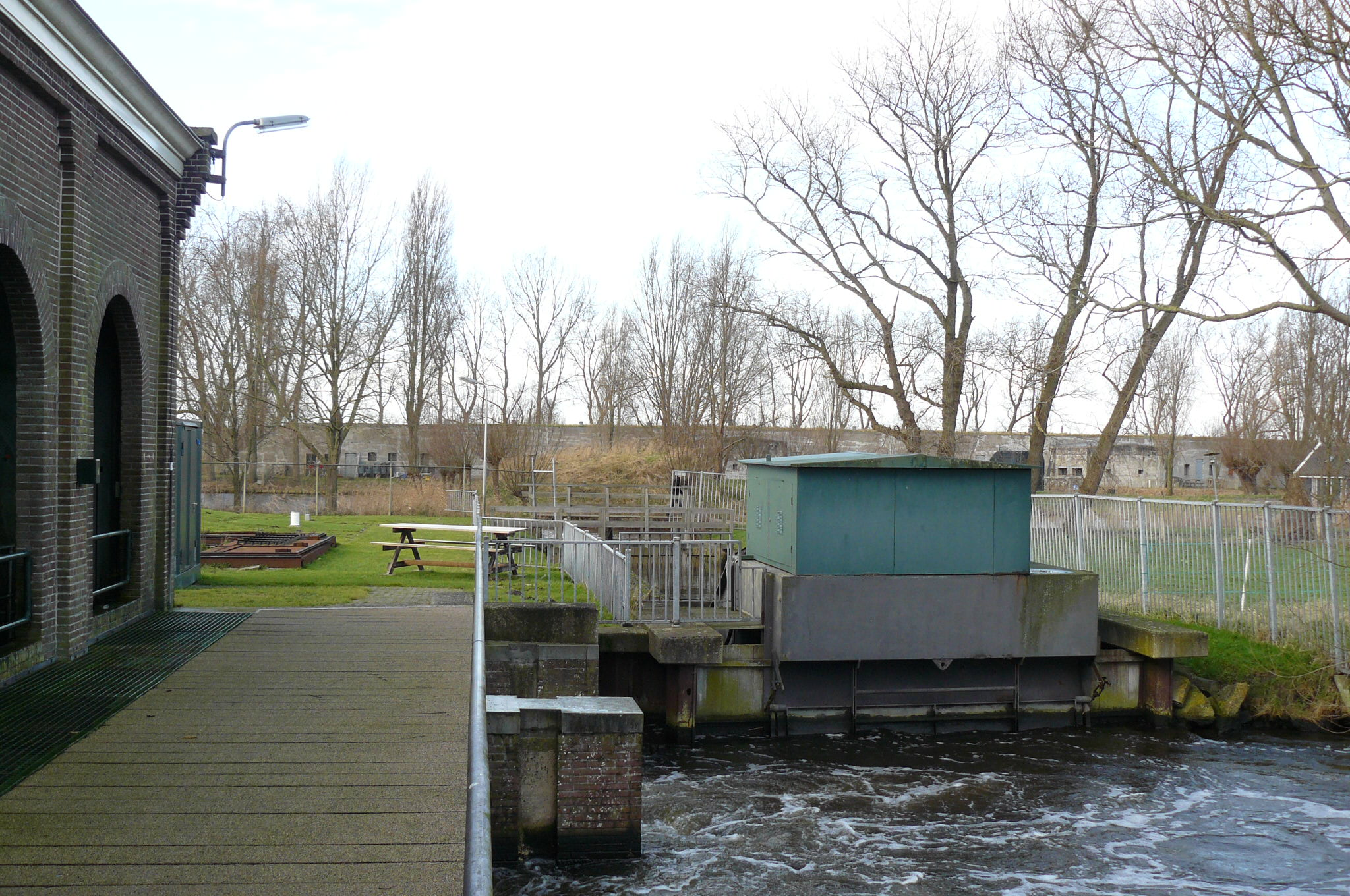 Het reserve vijzelgemaal bij het Gemaal Spaarndam.